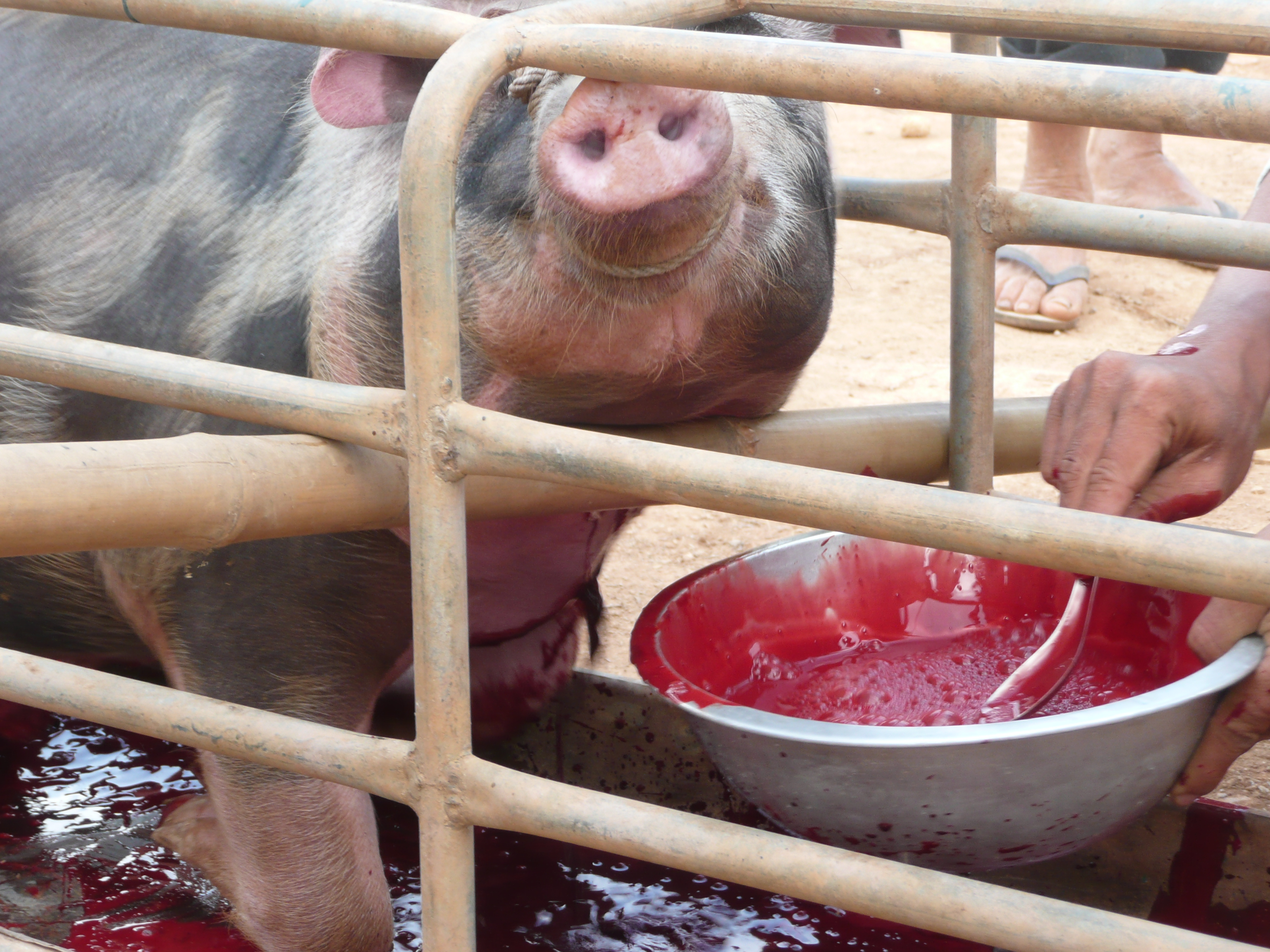 Disznóvágás, kivéreztetés